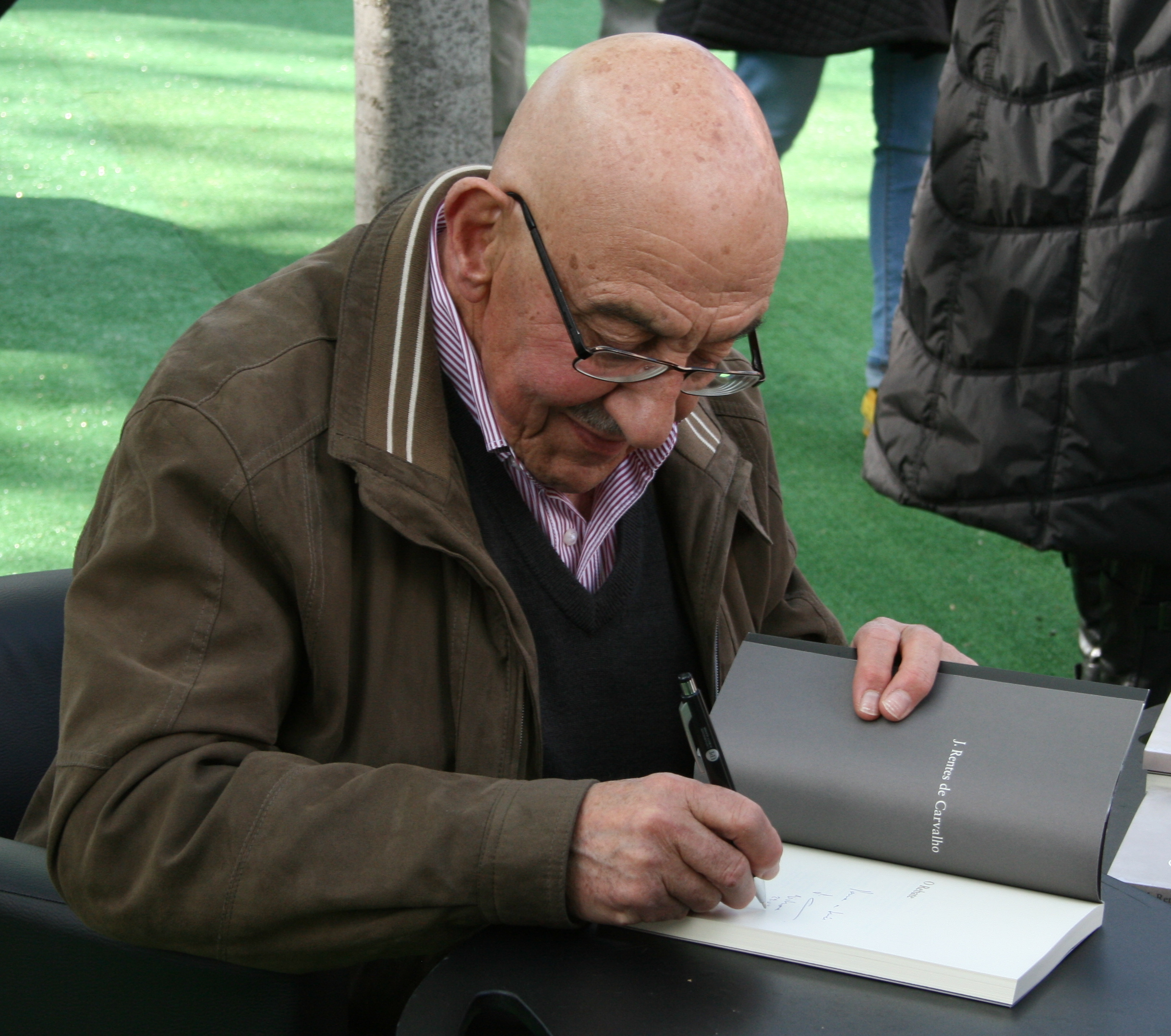 Rentes de Carvalho a autografar na Feira do Livro de Lisboa de 2012